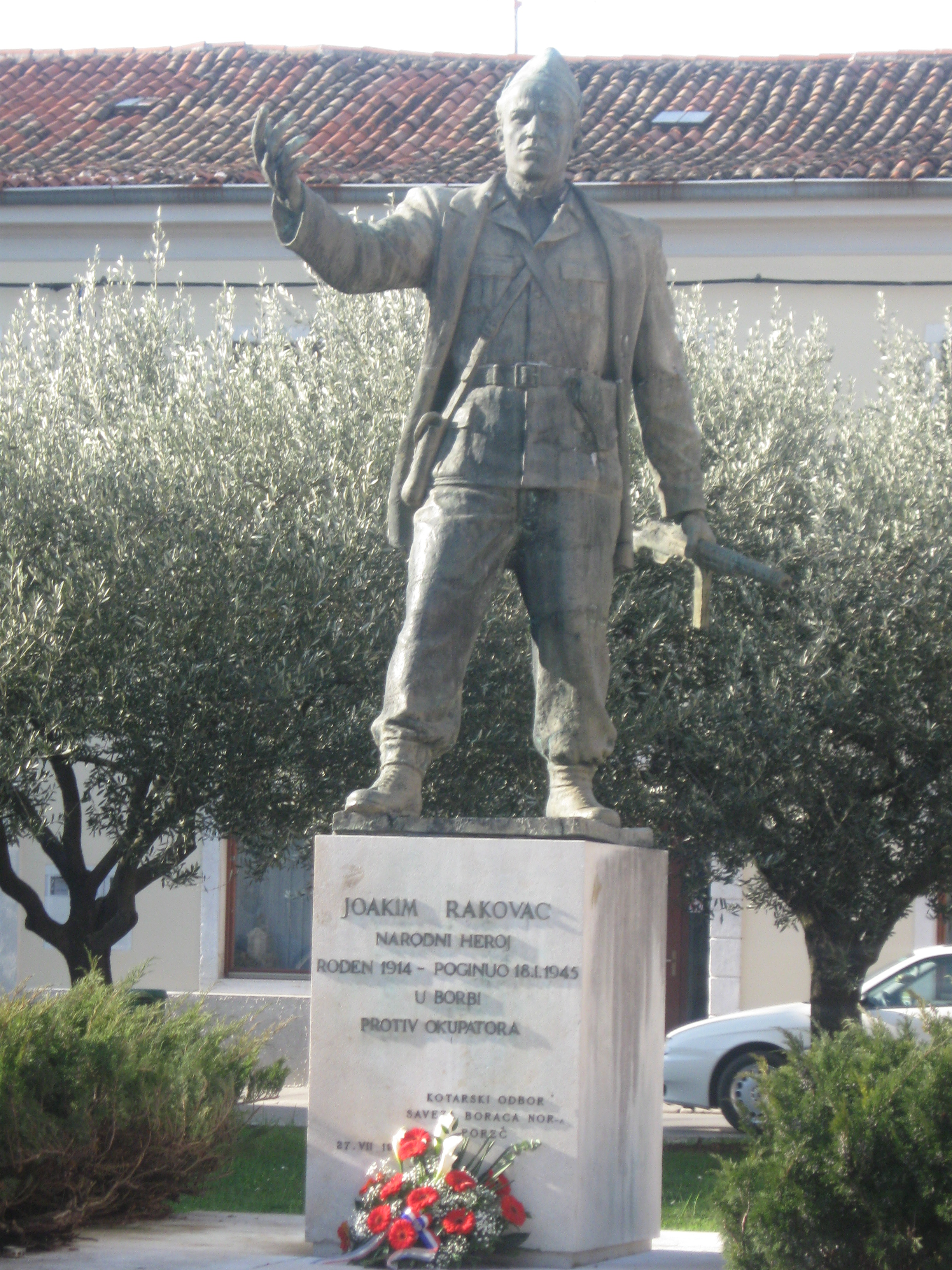 Spomenik narodnemu heroju v Poreču.